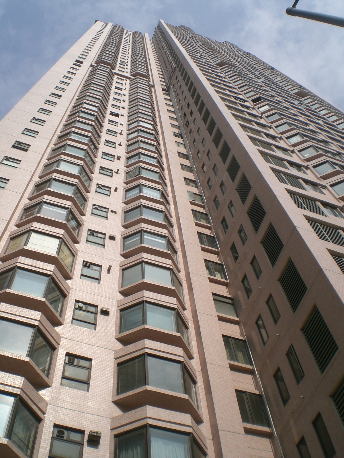 馬己仙峽道近花園道55號愛都大廈